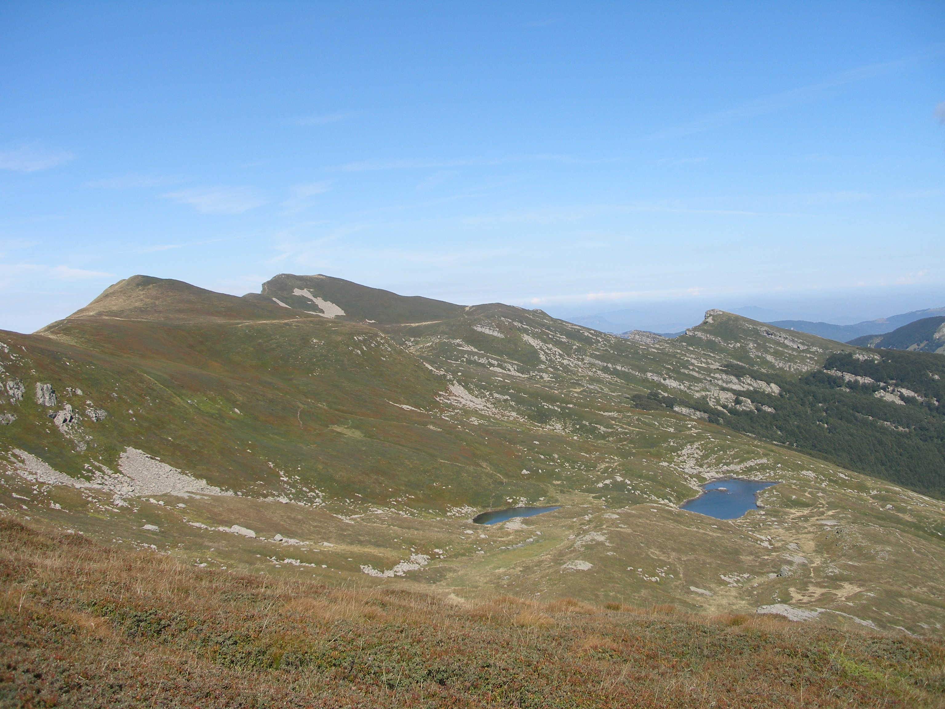 Laghetti di Compione - sullo sfondo il Monte Sillara m. 1861 - Alto Appennino parmense zona Est. Accessibili da Valditacca, Prato Spilla e Iera di Bagnone